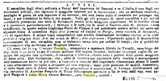 Proposta di vendita proprietà G. Panialis